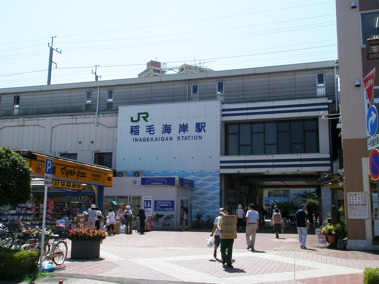 京葉線稲毛海岸駅北口から